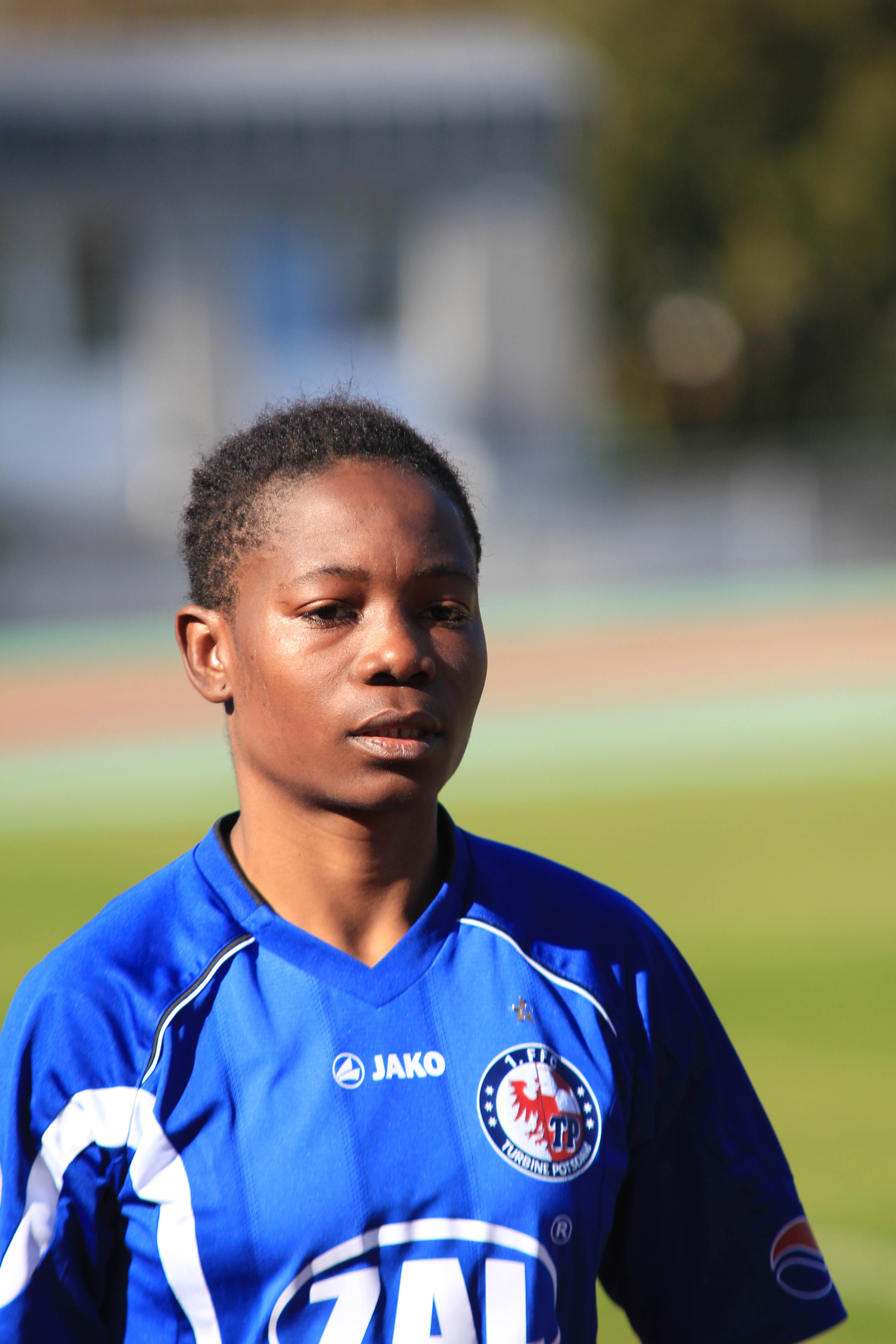 Equatoguinean footballer Genoveva Añonma, Turbine Potsdam